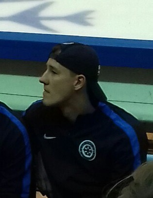 Олег Губин на встрече команды "Сибирь" с болельщиками 19 августа 2016 года